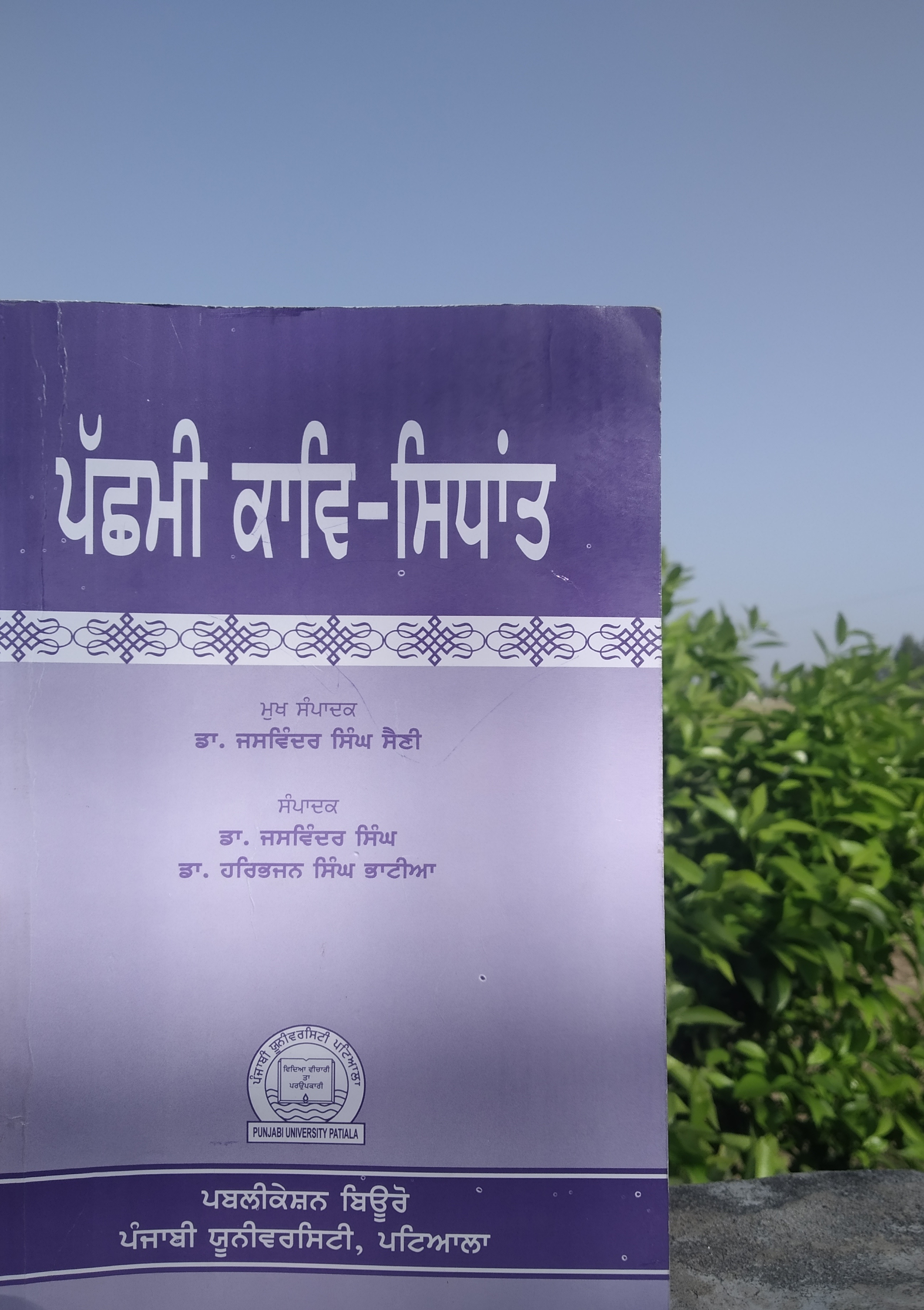 ਪੰਜਾਬੀ: ਪੁਸਤਕ ਦਾ ਸਰਵਰਕ